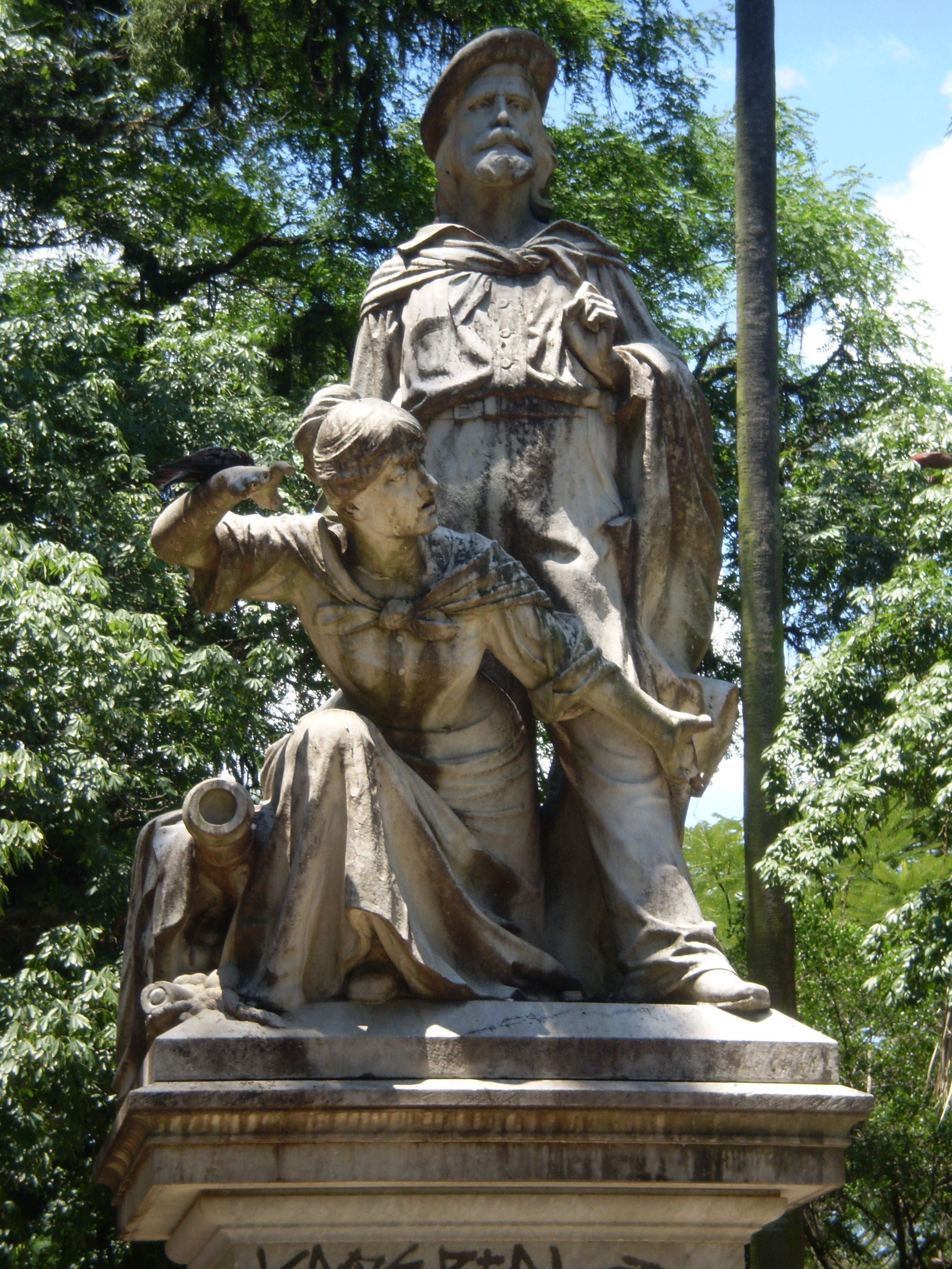 Garibaldi Place, Statue of Anita and Giuseppe Garibaldi, Azenha, Porto Alegre, Rio Grande do Sul, Brazil.